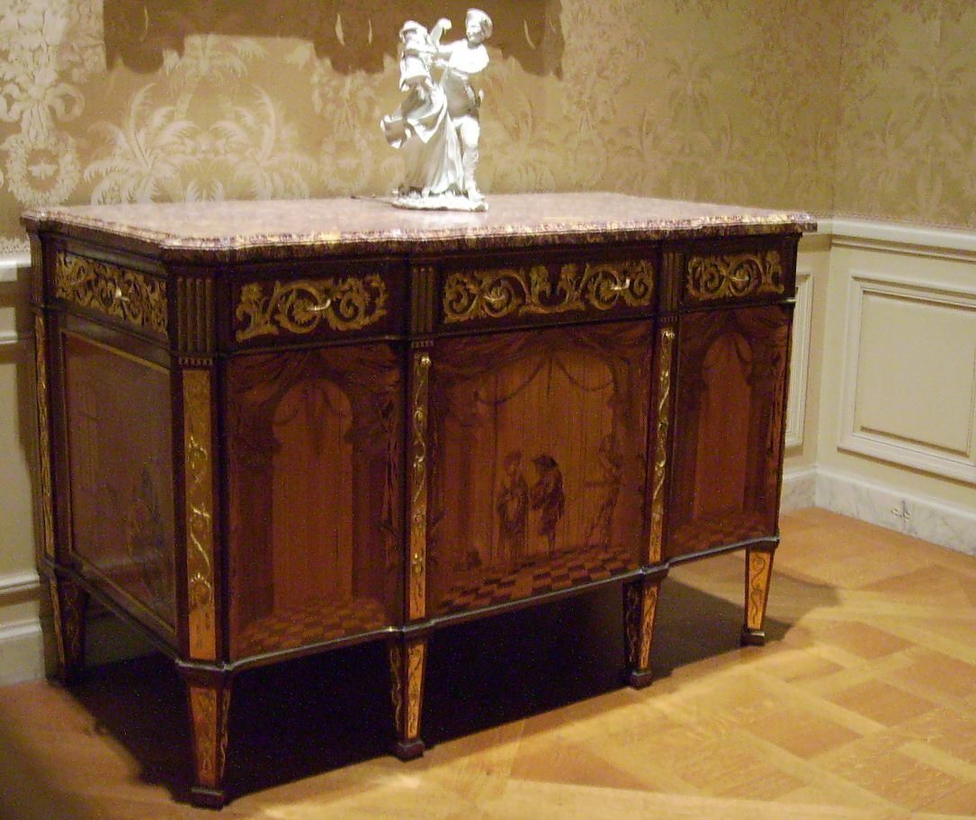 Kommode (Chinoiserie) von David Roentgen, Neuwied; Metropolitan Museum of Art, New York City, Jack and Belle Linsky Collection. Wie aus der Eigentumsmarke auf der Rückseite zu ersehen ist, stammt das Möbelstück ursprünglich aus dem Inventar des Schlosses Versailles und stand in den Privaträumen von Ludwig XVI.